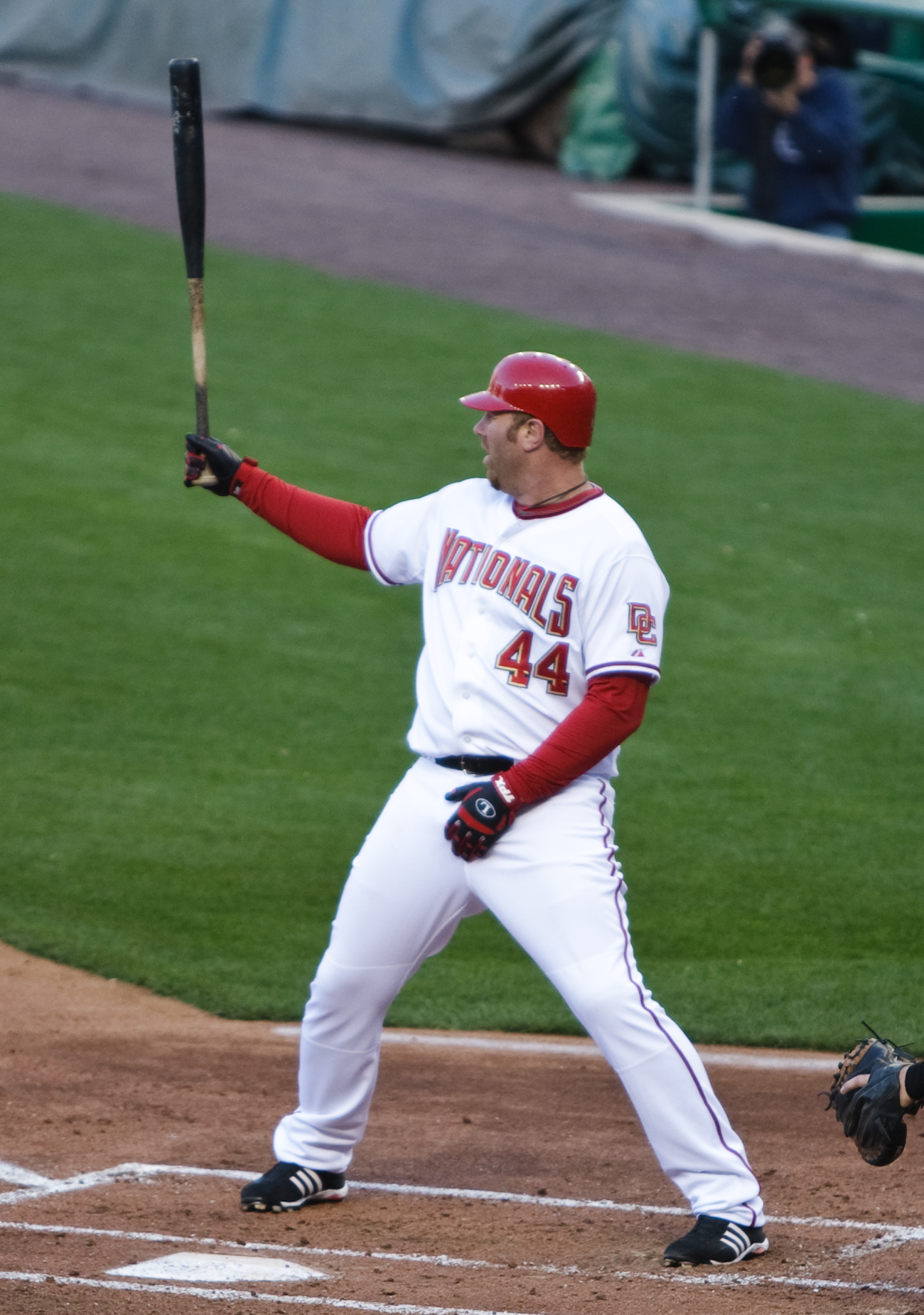 Adam Dunn